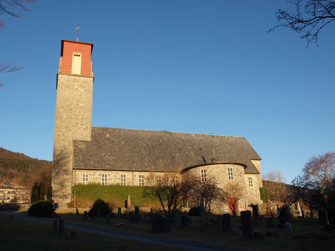 Volda kyrkje, Vold, Møre og Romsdal